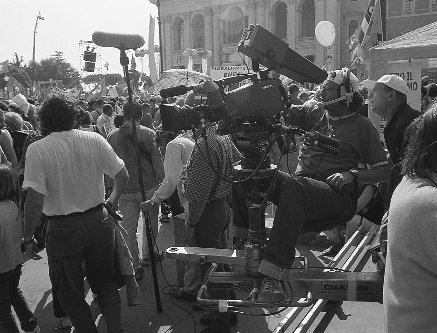 Cameram su Dolly 2020